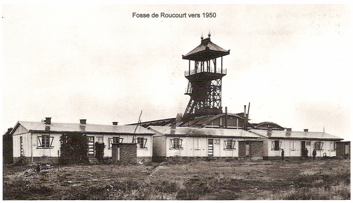 Fosse de Roucourt à Roucourt vers 1950